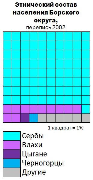 Этнический состав населения Борского округа (Сербия)